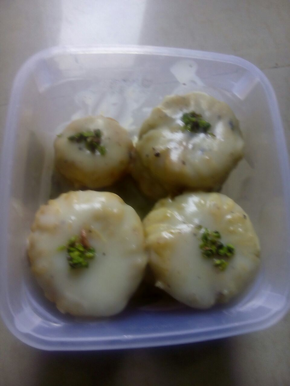 ગુજરાતી: Surti Ghari